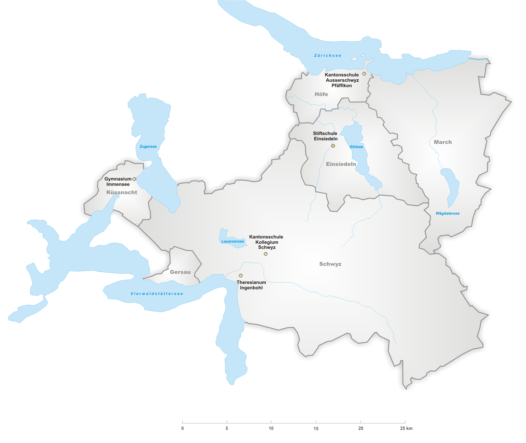 Kantonsschulen des Kanton Schwyz